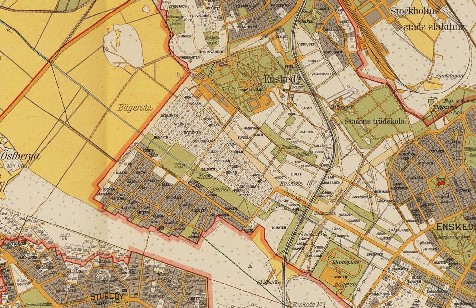 Del av 1934 års karta över Stockholm med omgivningar visande Enskedefältet